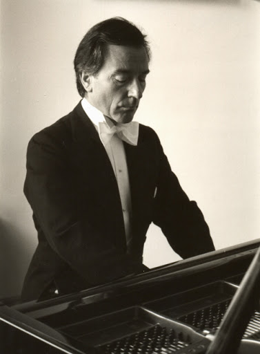 Fotografía de Ricardo Requejo guardada en el Archivo Municipal de Irún